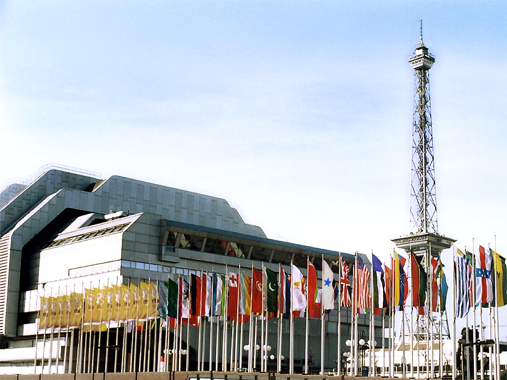 Das ICC und der Funkturm in Berlin.